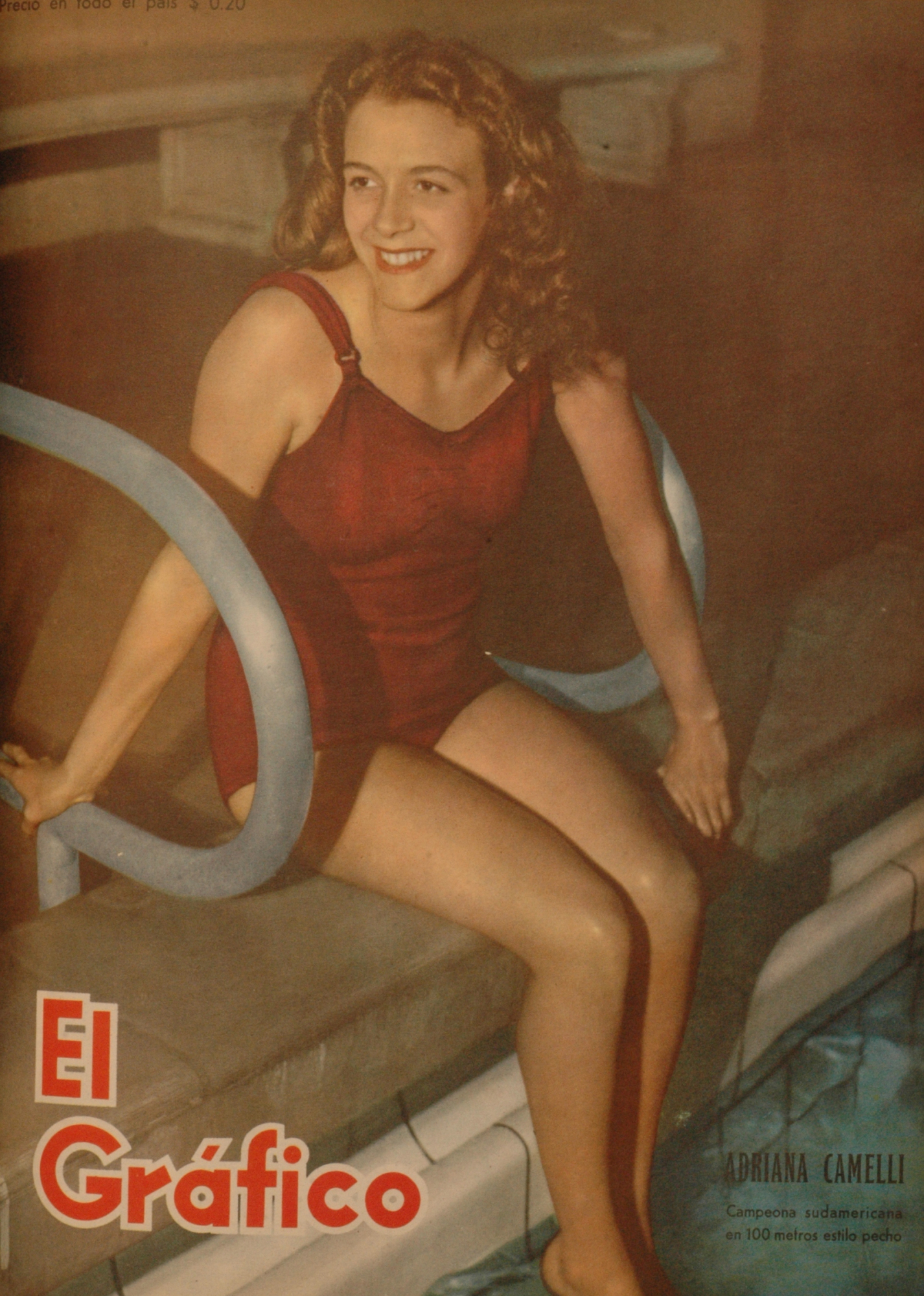 El Grafico del 07 de Junio de 1946. Edicion 1404